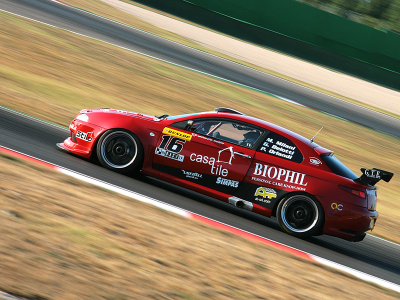 Alfa Gt